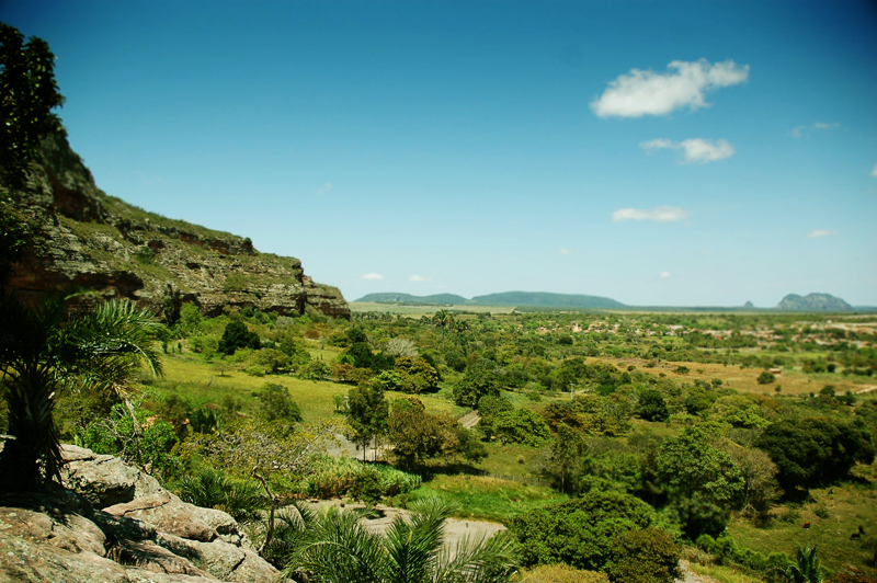 Parque Nacional da Serra do Catimbau